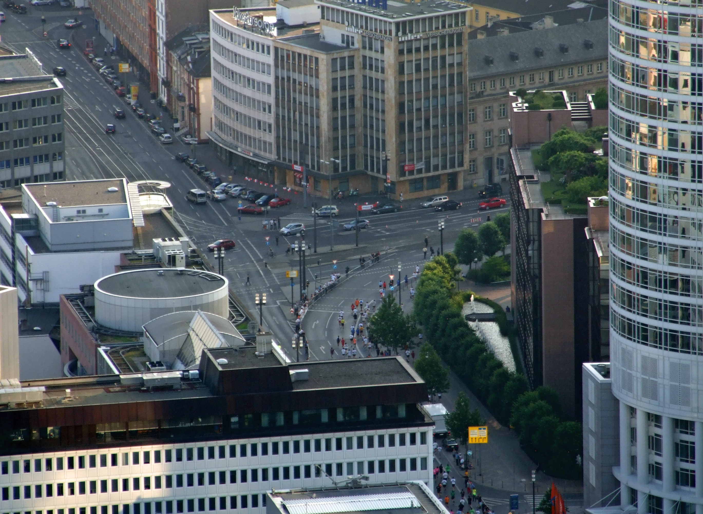 Der Platz der Republik schliesst sich rechts an die Mainzer Landstrasse an, wo er danach in die Friedberger Anlage übergeht. Links führt die Düsseldorfer Strasse vor den Hauptbahnhof in Ffm